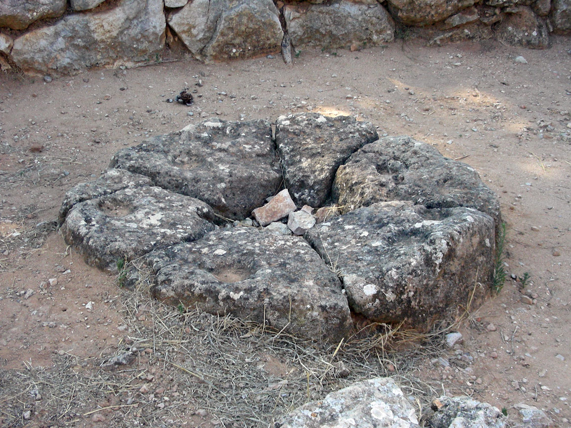 Italia, Sardegna, provincia di Sassari, Alghero, nuraghe e villaggio nuragico di Palmavera, recinto esterno del nuraghe, parte "privata", imboccatura di silos sotterraneo